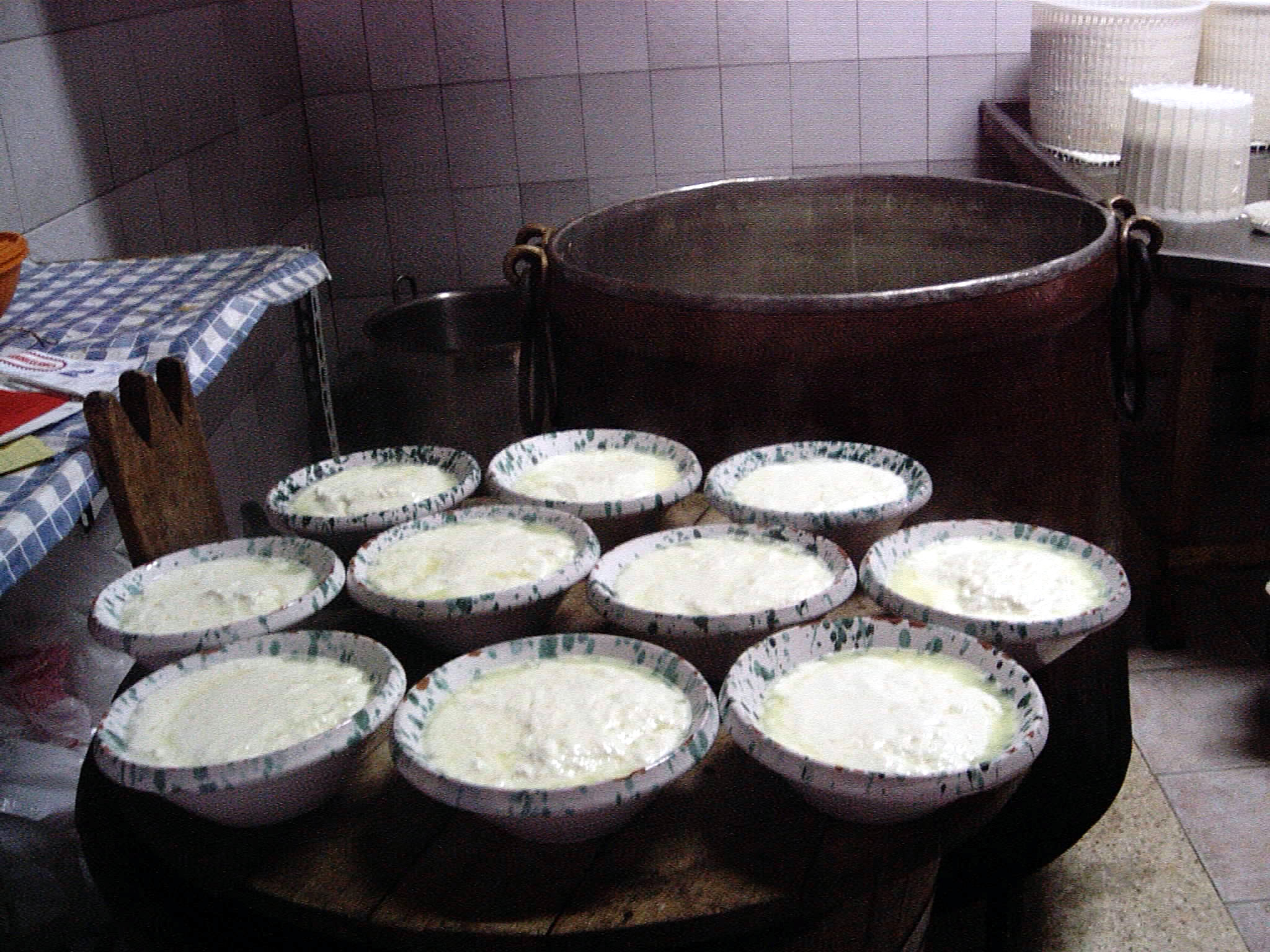 Ciotole di ricotta di pecora dei Monti Sicani, Sicilia